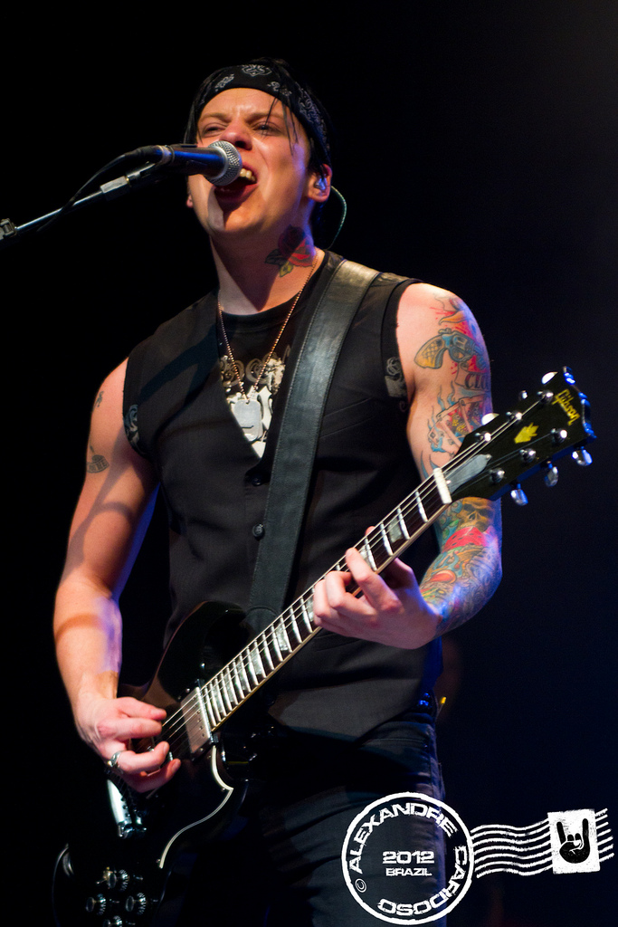 Queensrÿche ao vivo no HSBC Brasil - 14/04/2012 - São Paulo, Brasil